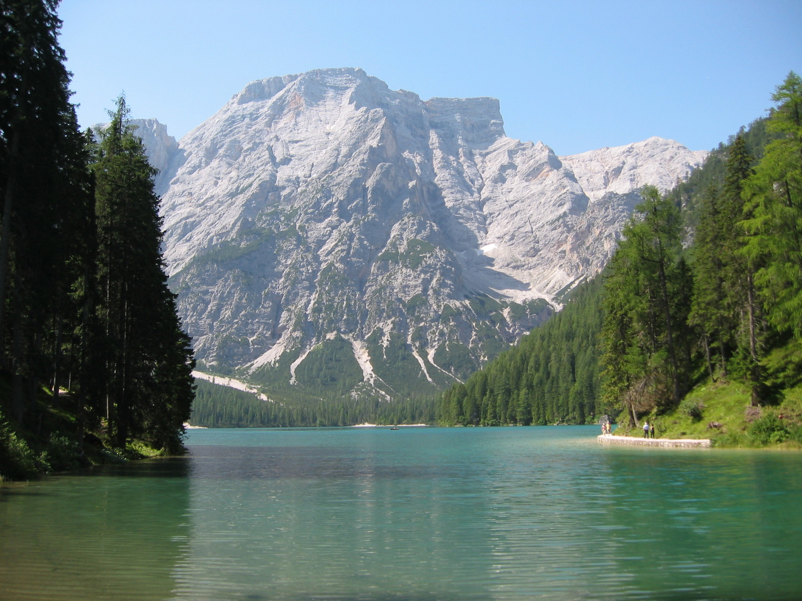 Pragser Wildsee Seekofel von Bucht aus gesehen